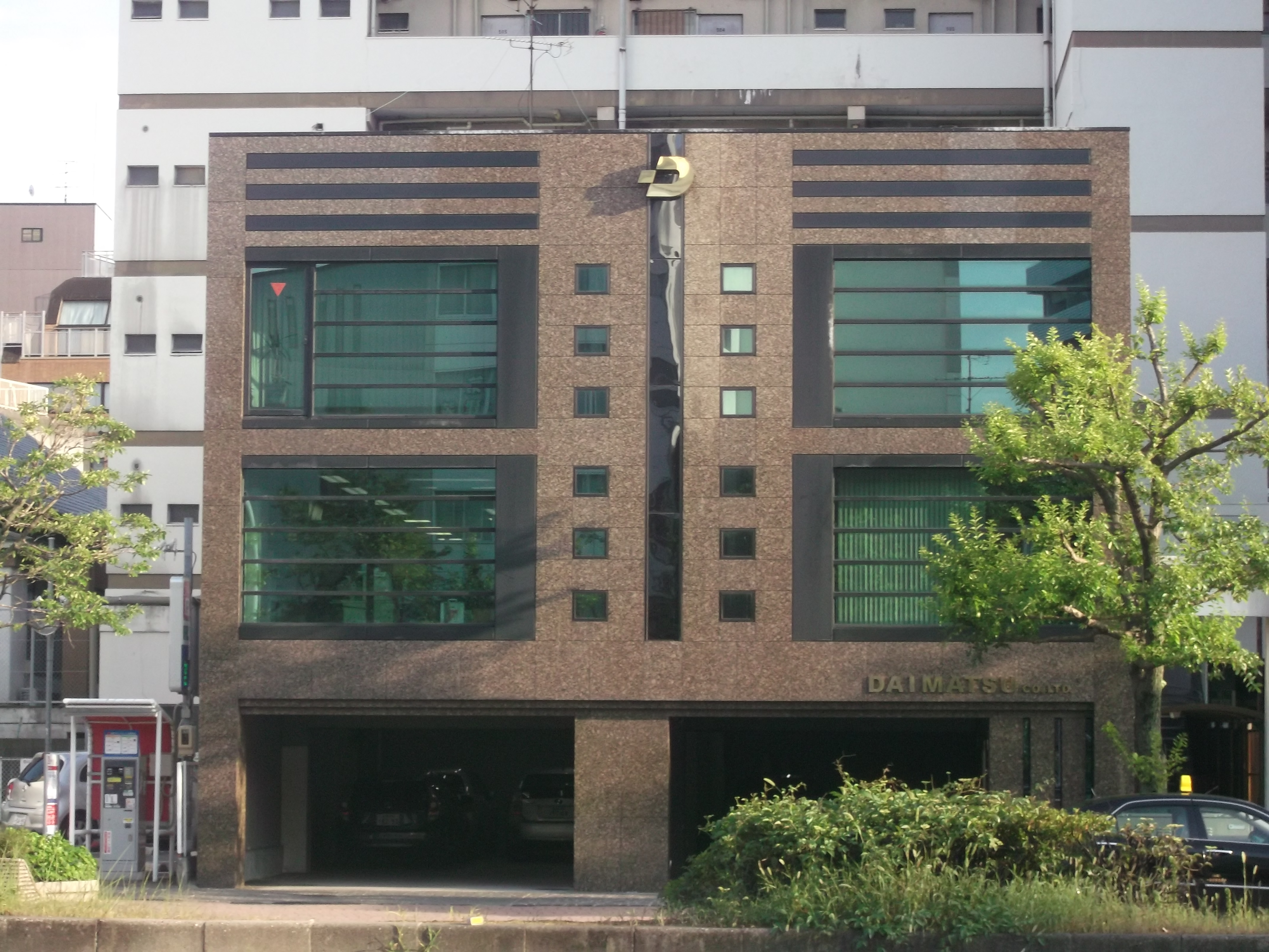 名古屋市東区東桜の大松本社を北側公道より撮影